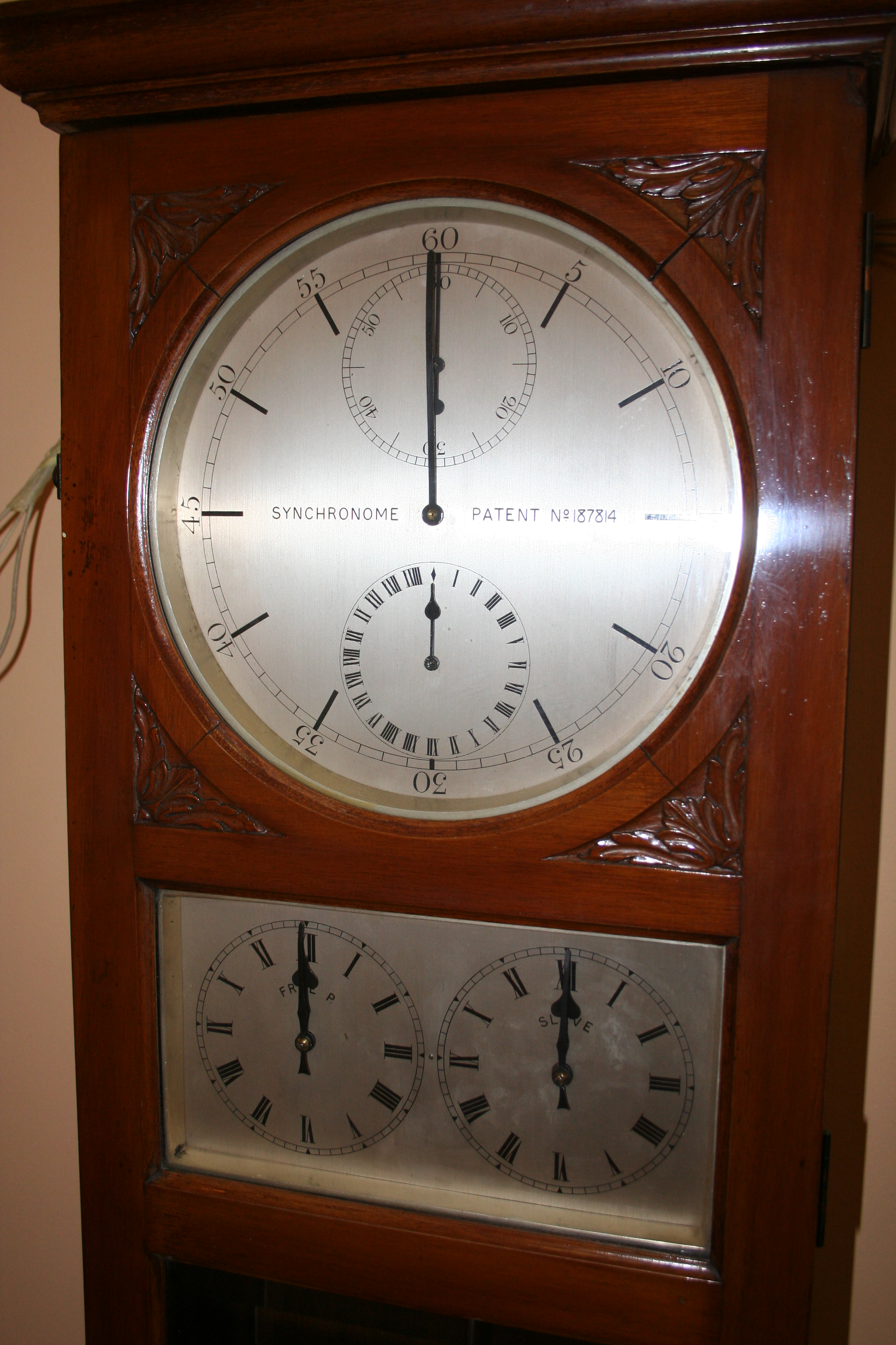 Tarcze zegara "sługi"